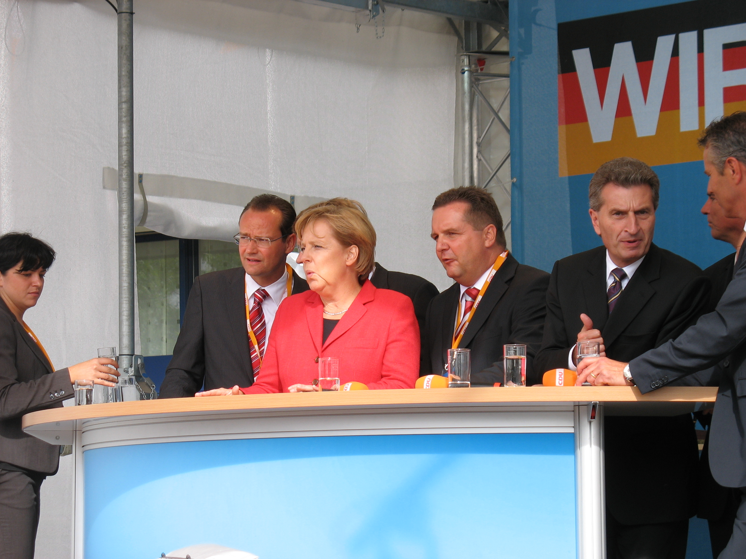 Bundeskanzlerin Angela Merkel mit MdB Gunther Krichbaum, Landesfraktionschef Stefan Mappus und Ministerpräsident Günther Oettinger